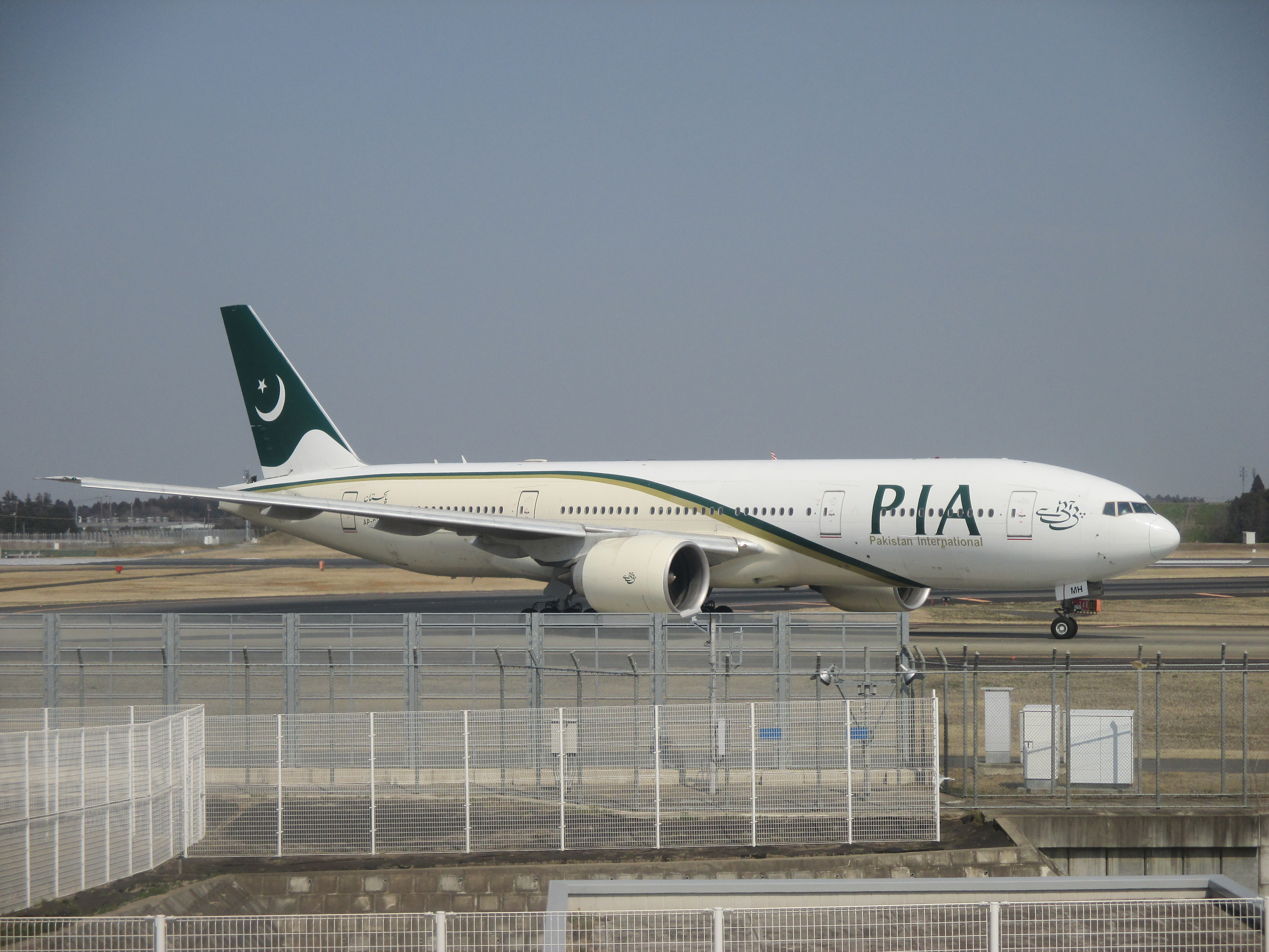 成田国際空港で撮影